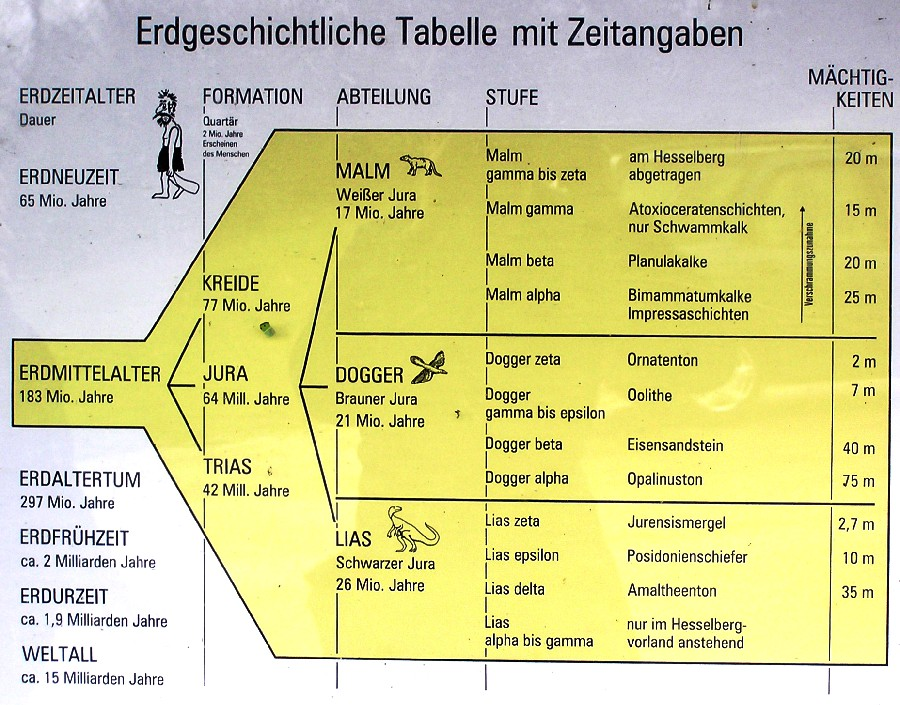 Ausschnitt aus einer Informationstafel des Geologischen Wanderpfades auf dem Hesselberg Fotograf: Oswald Engelhardt